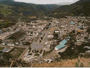 Vista panorámica de la ciudad de Alausi, en la Provincia de Chimborazo en la cordillera central del Ecuador.